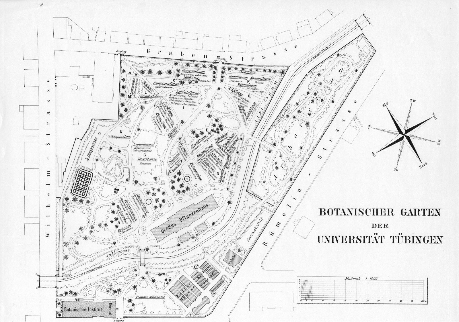 Botanischer Garten der Universität Tübingen